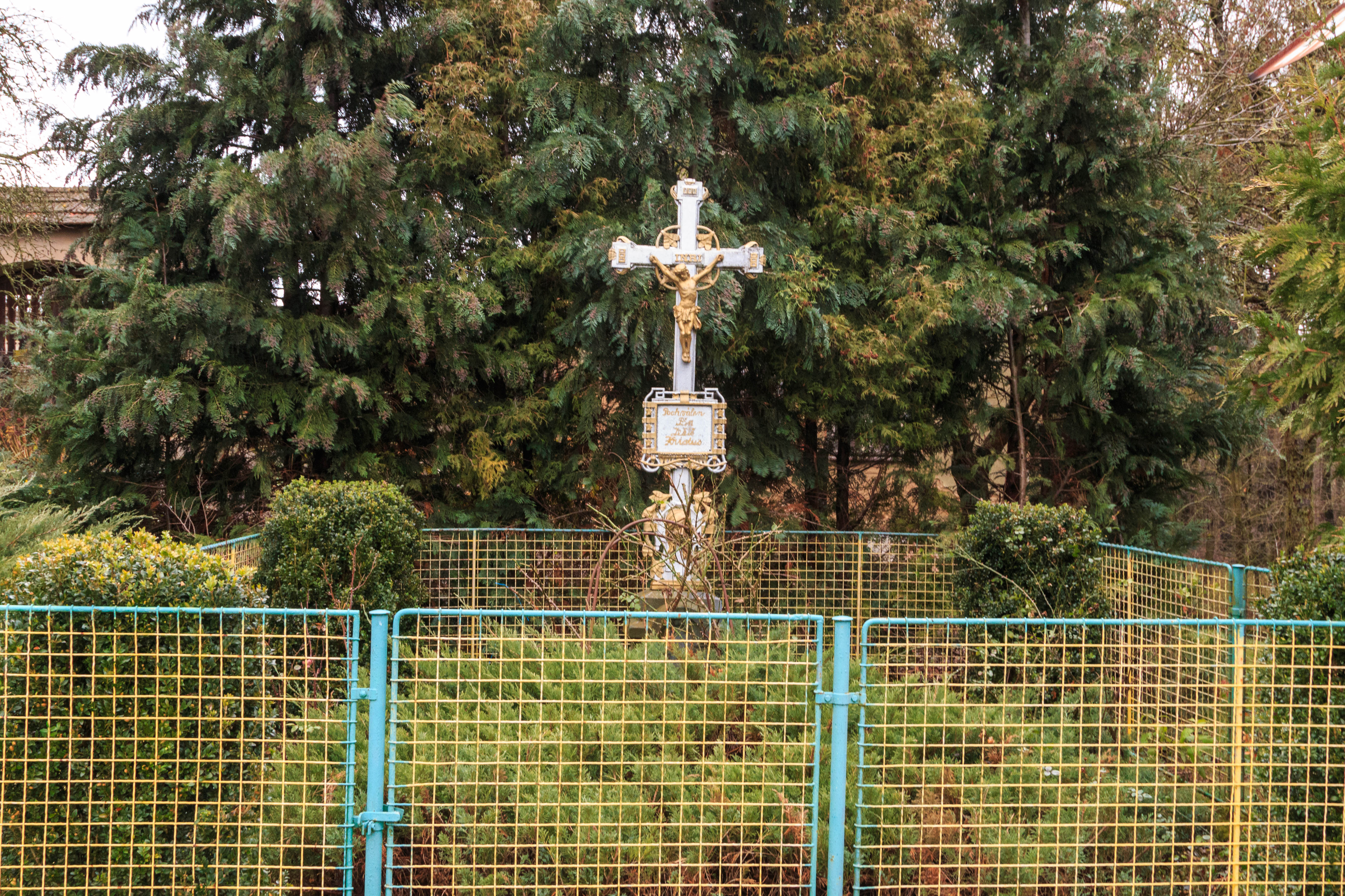 Lubno křížek